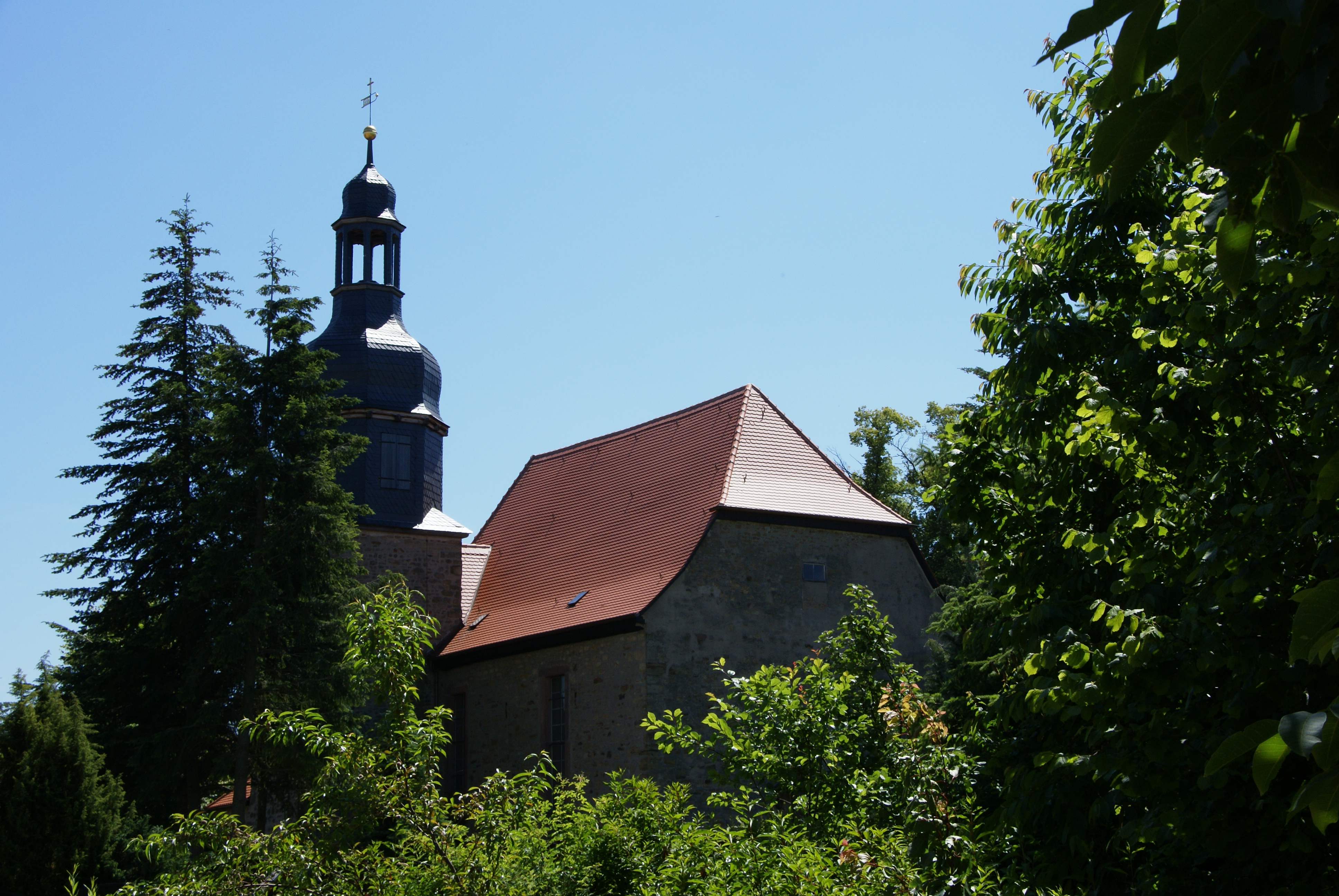 Kirche in Hauteroda (An der Schmücke) im Kyffhäuserkreis in Thüringen.